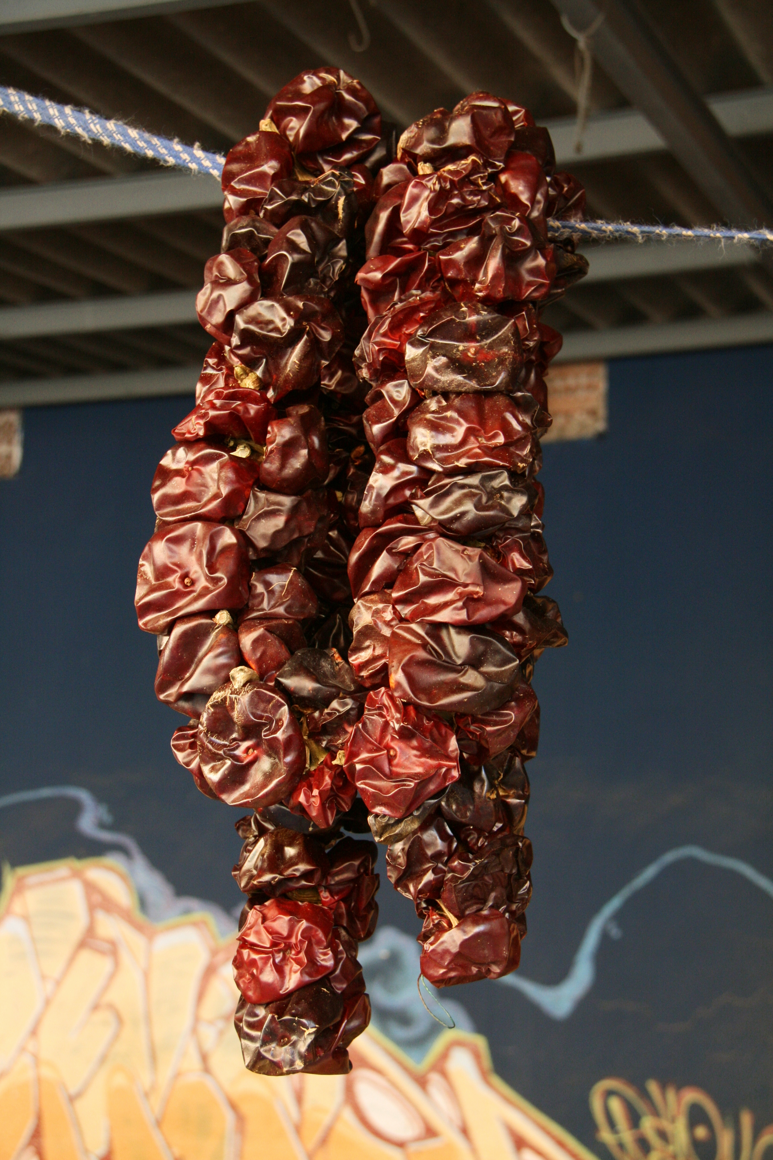 Racimo de Ñoras secas